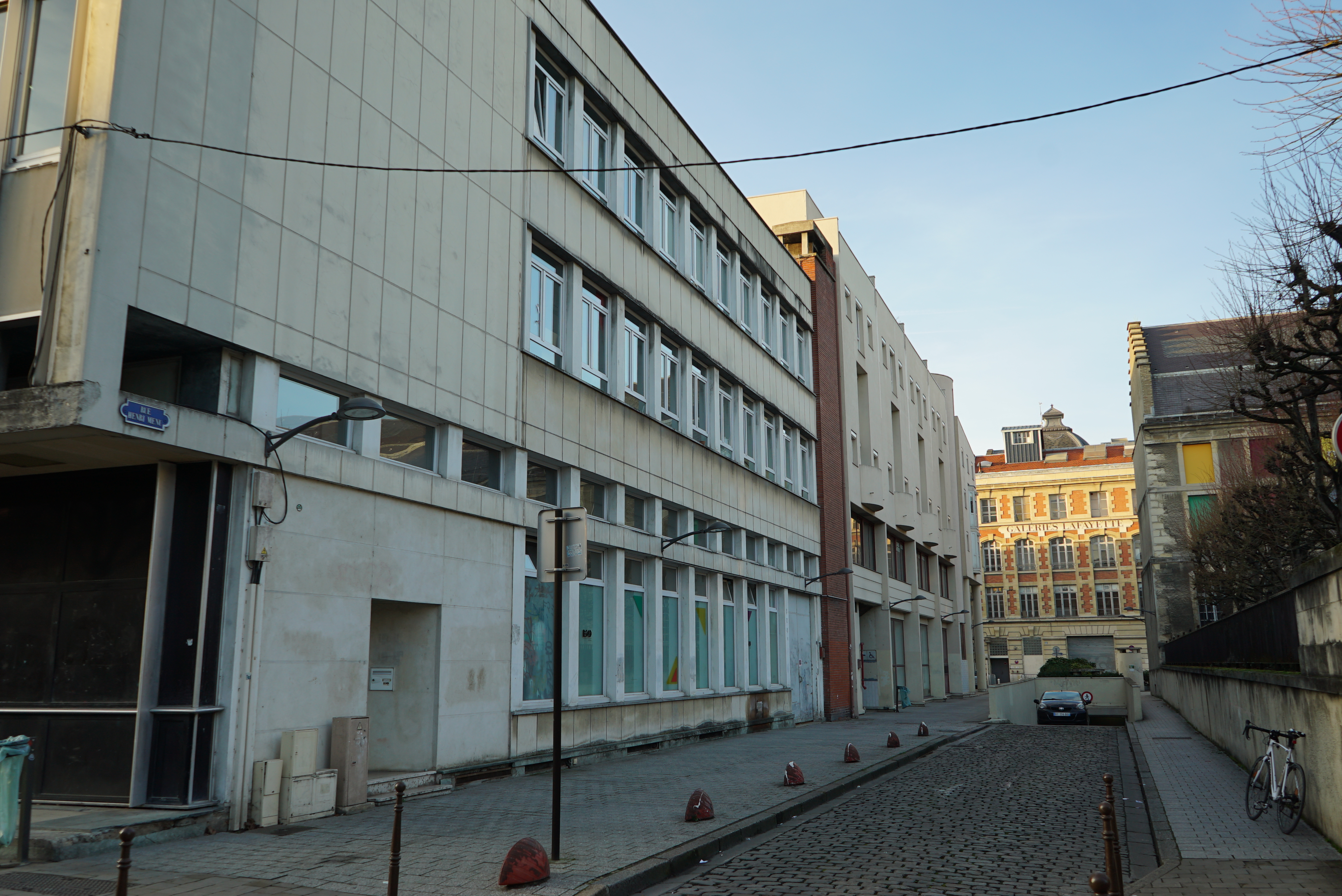 vue de la rue Henri-Menu, à Reims.